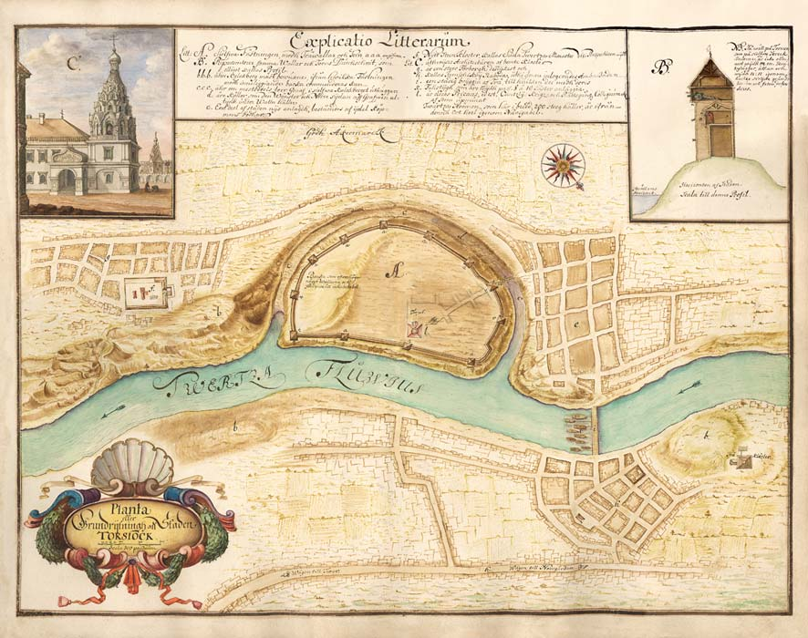 Карта Торжка.